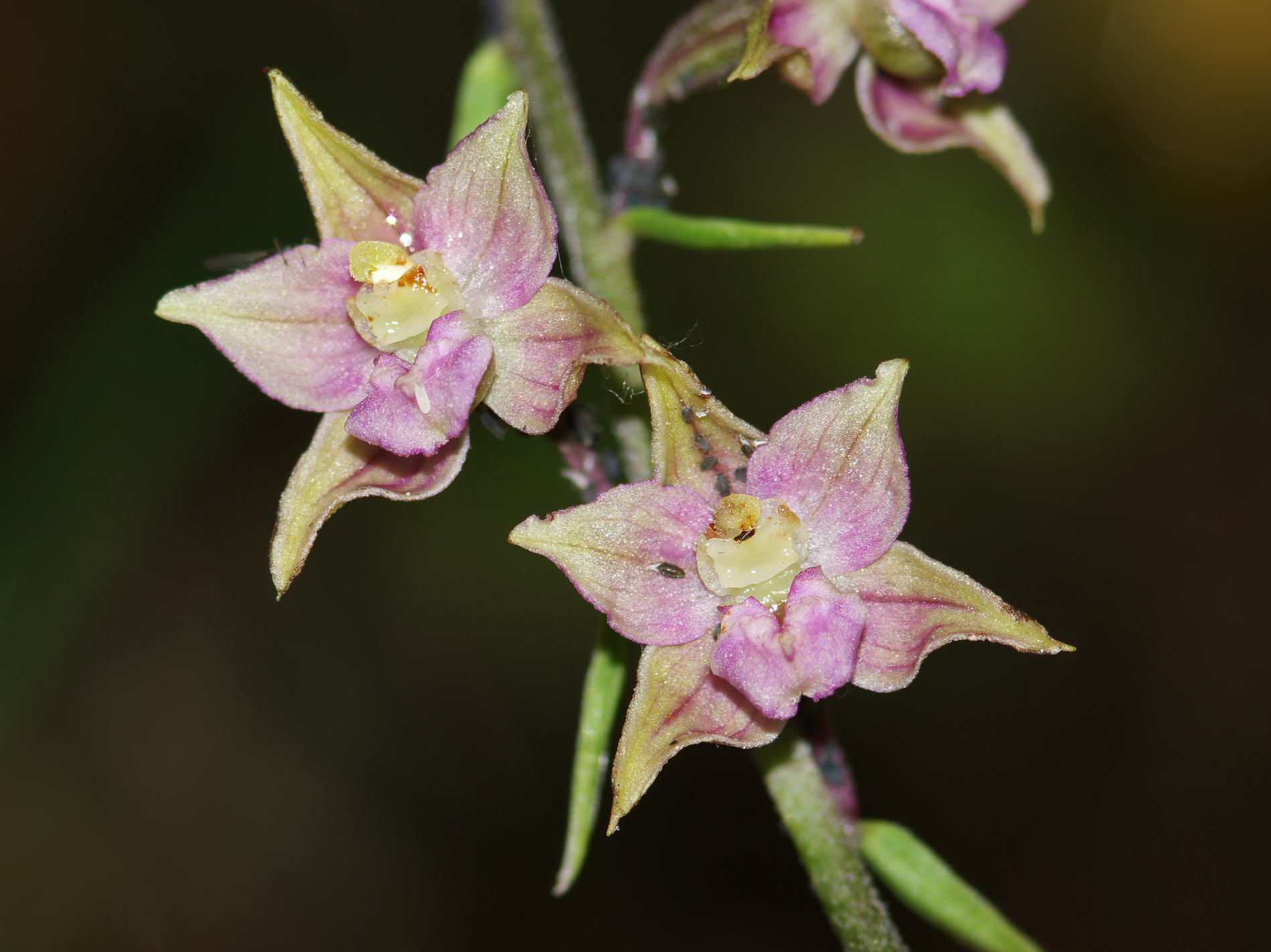 Kruszczyk szerokolistny (Epipactis helleborine) Kuźnica Warężyńska w Dąbrowie Górniczej